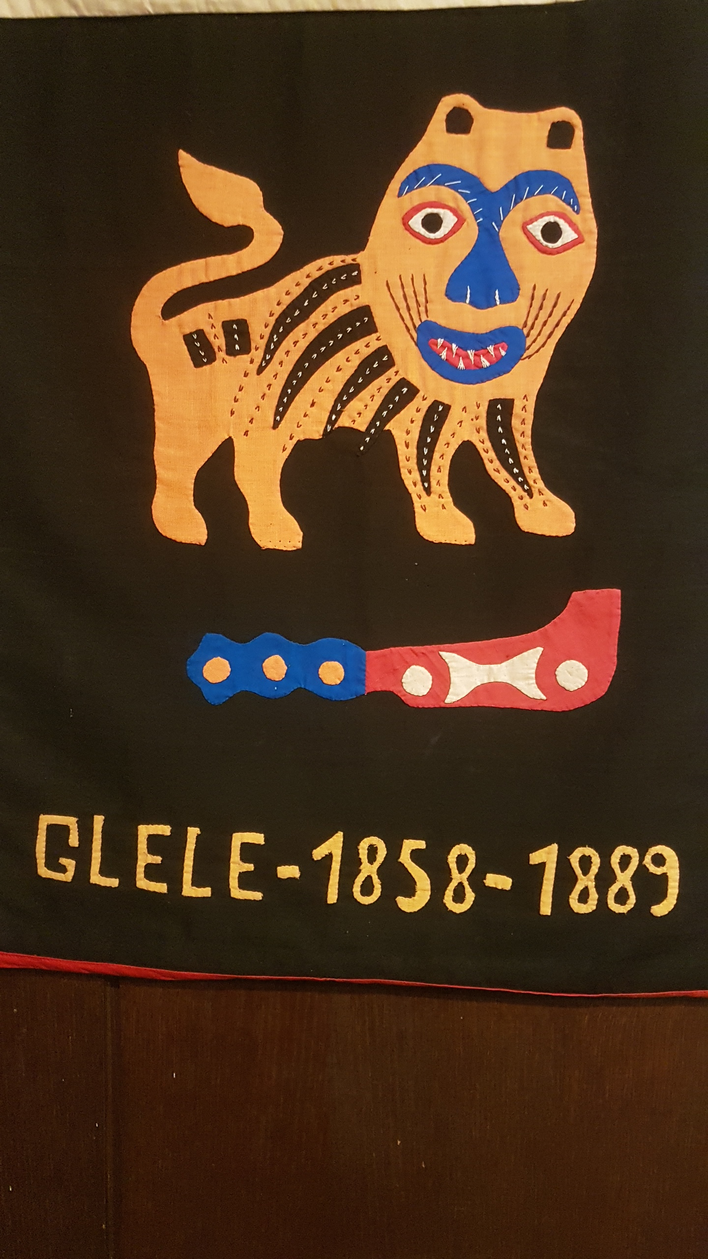 Српски (ћирилица): Дахомејска тканина - Владар Glele (1858-1889)